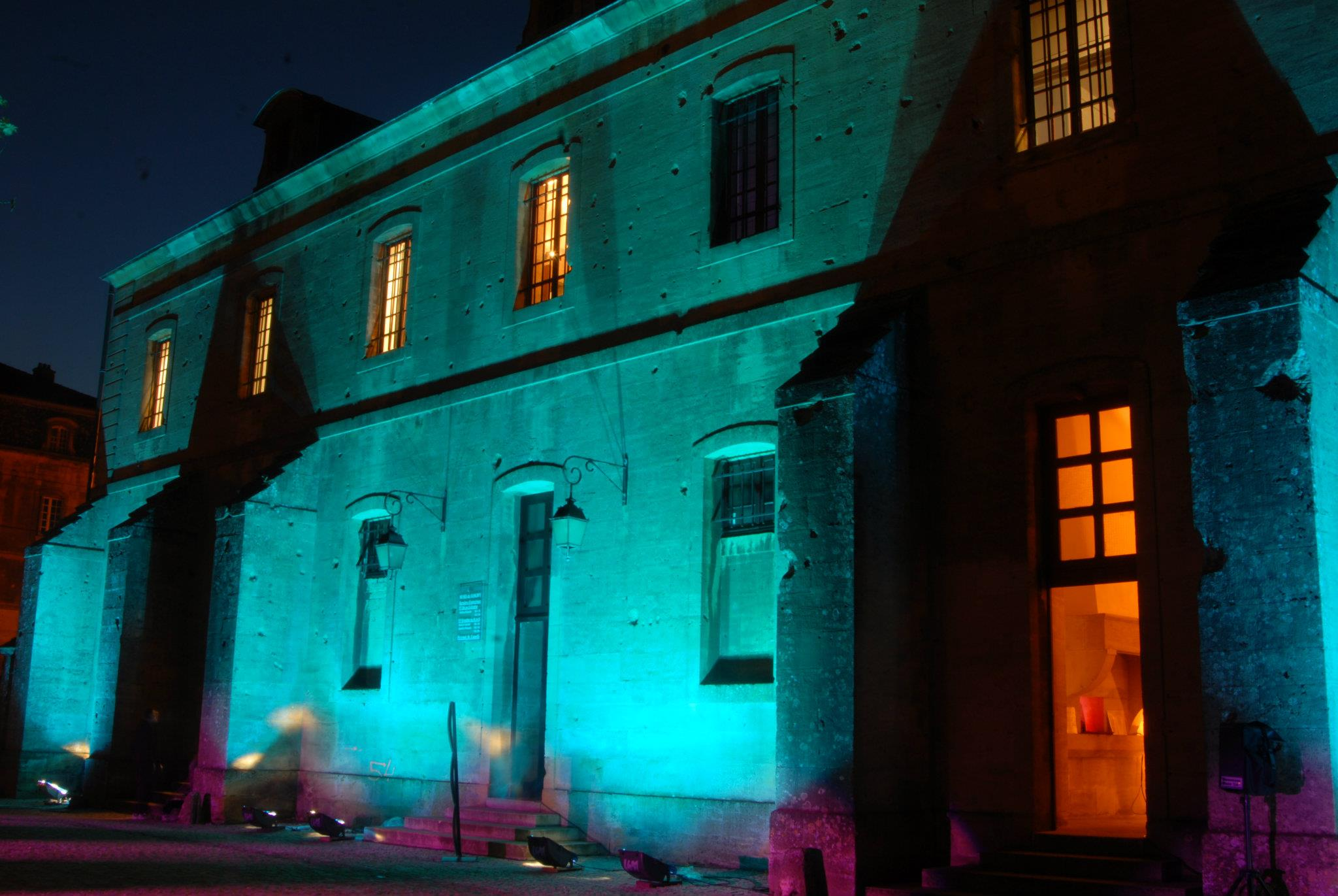 Mise en lumière du Musée des Emaux et Faïences de Longwy à l'occasion de la Nuit des Musées 2012